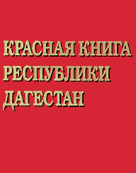 Обложка Красной книги Республики Дагестан